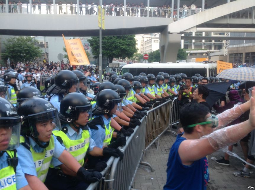 中文（台灣）: 港人聲援佔中抗拒警方封鎖中環金鐘多處癱瘓